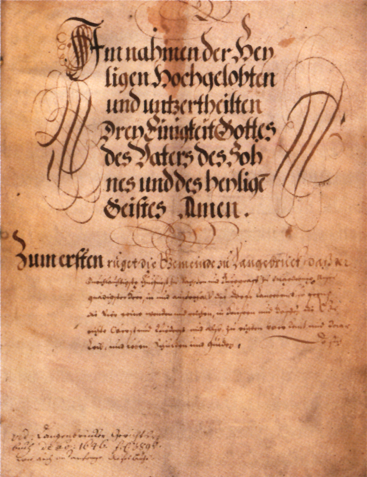 Langebrücker Rügen und Freyheiten, erste Seite einer am 29. August 1648 beglaubigten Fassung